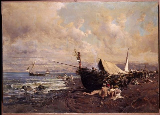 Niños con barcos en una playa de Nápoles. Óleo sobre lienzo, 90 x 125 cm. Colección privada.